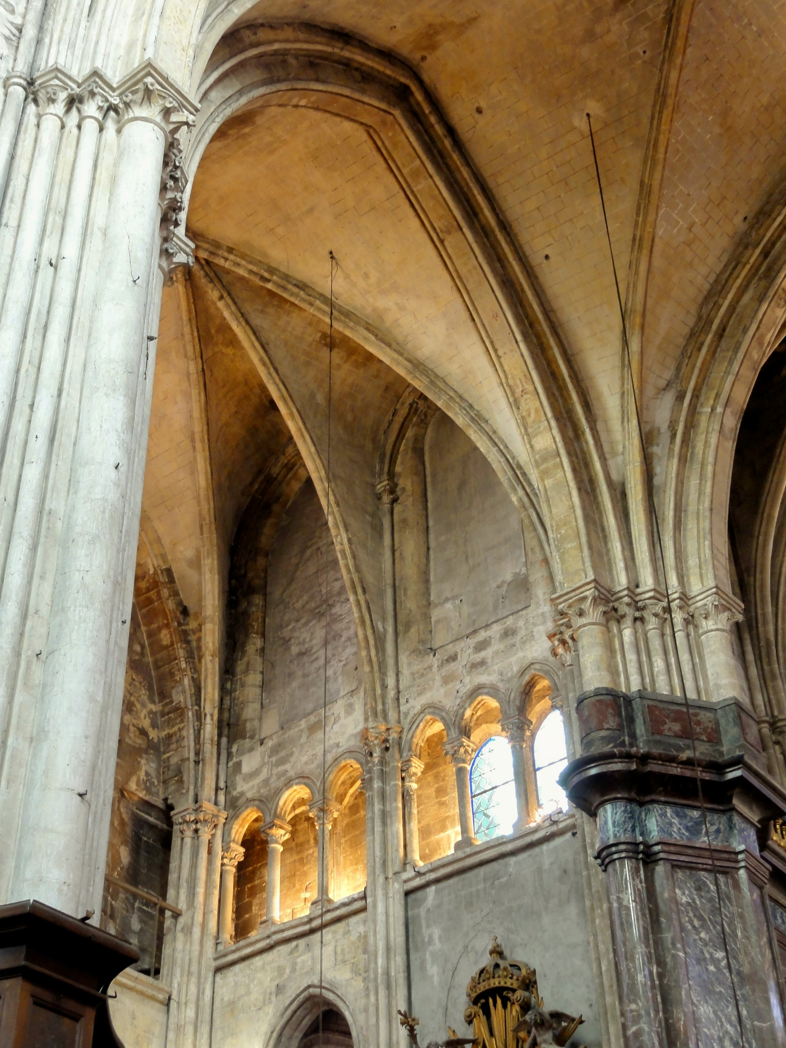 Croisillon sud, triforium côté ouest.